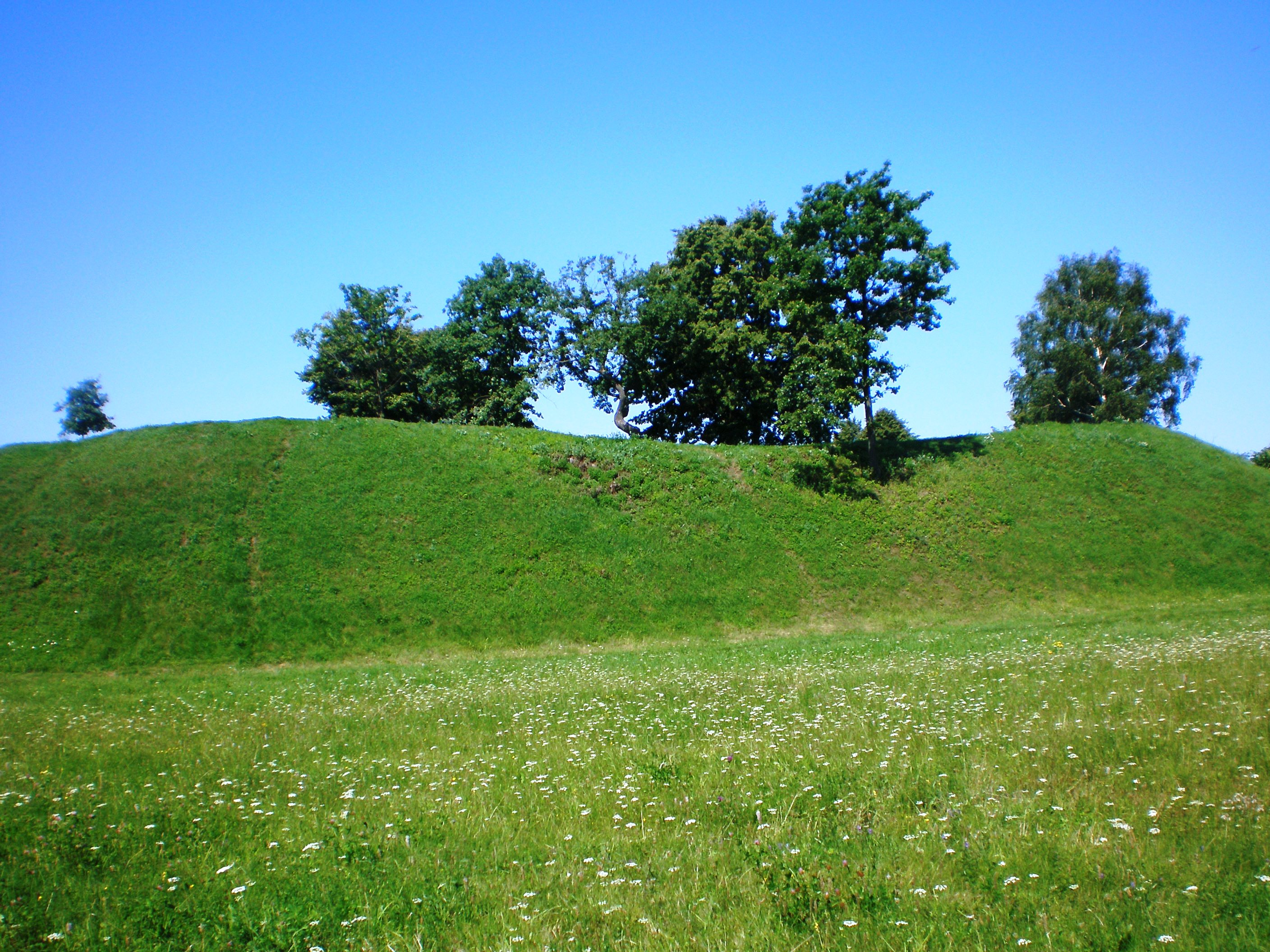 Bakainiai castlehill, Lithuania